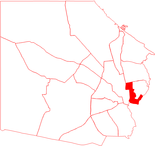 Ubicación de la parroquia Bolivar en el municipio Maracaibo